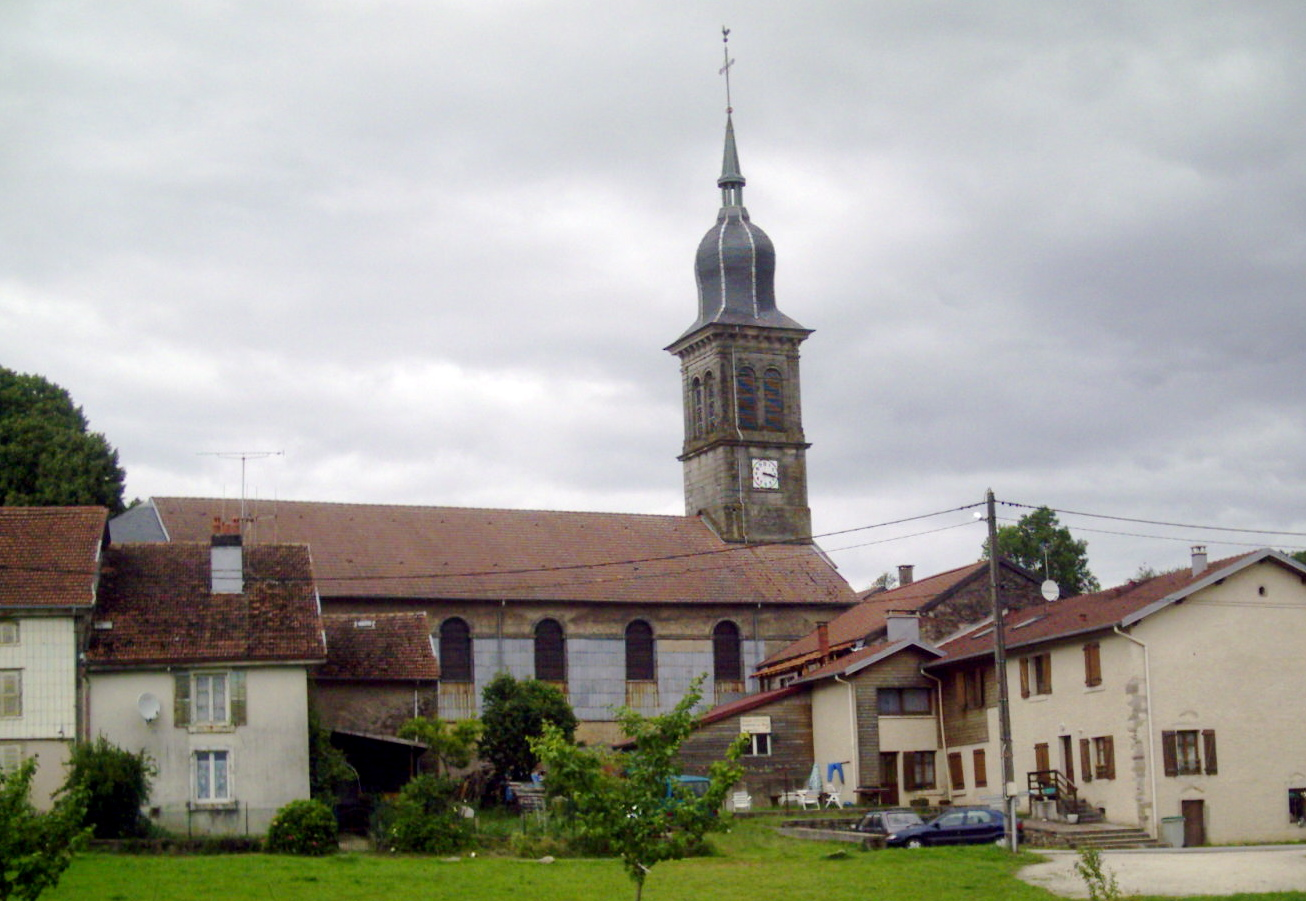 Commune de Les Voivres (88) : Église Saint-Remy et rue principale